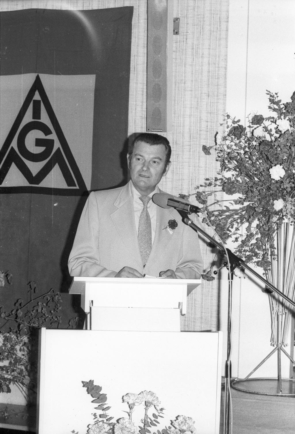 in der Legienstraße 20-24. Am Rednerpult der SPD-Landtagsabgeordnete und Erste Bevollmächtigte der IG Metall Kiel Alfred Prezewowsky.